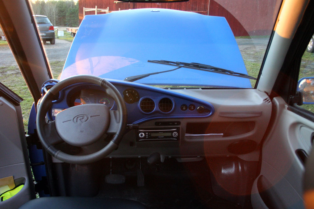 Reva Electric Car Interior